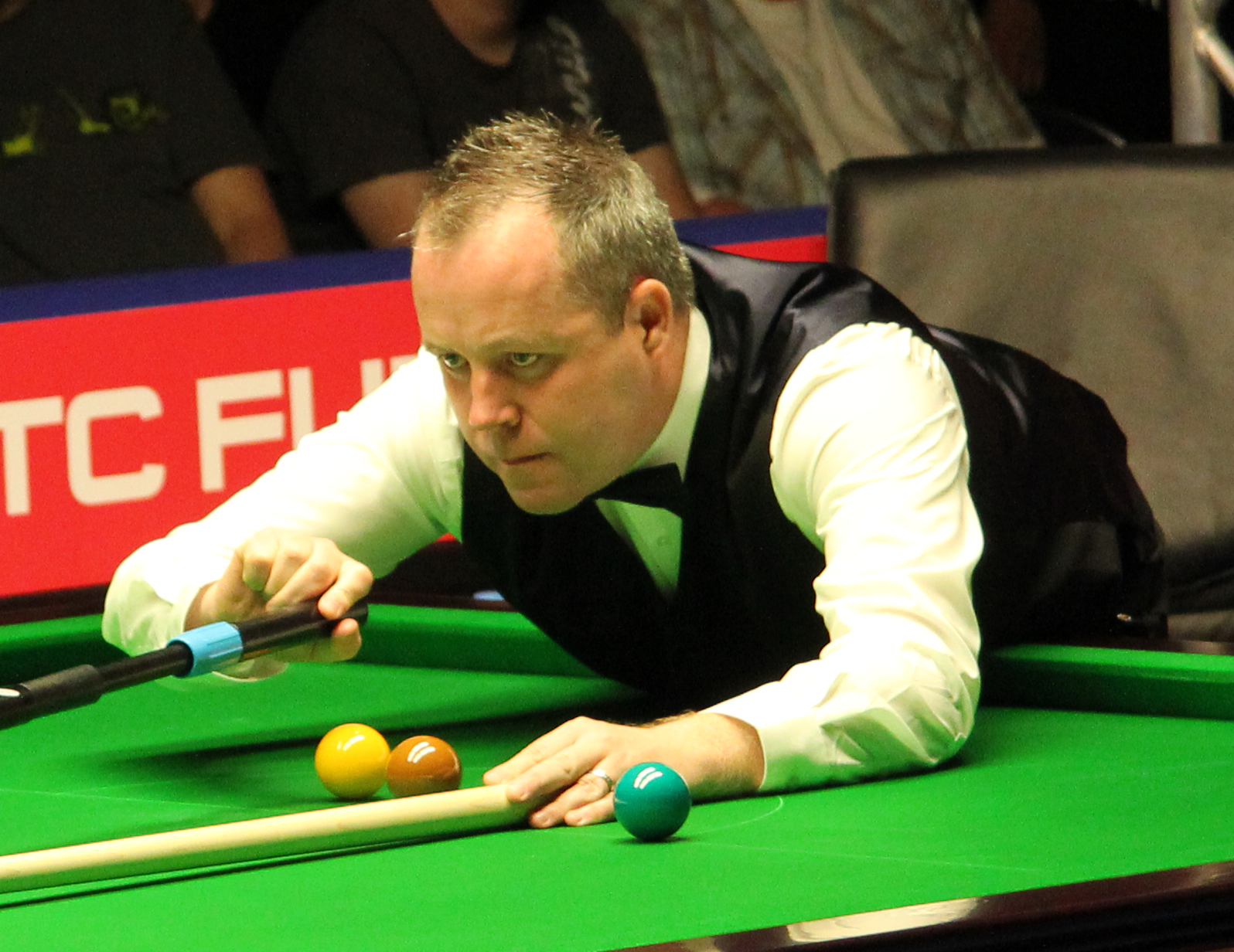 John Higgins beim Paul Hunter Classic 2011